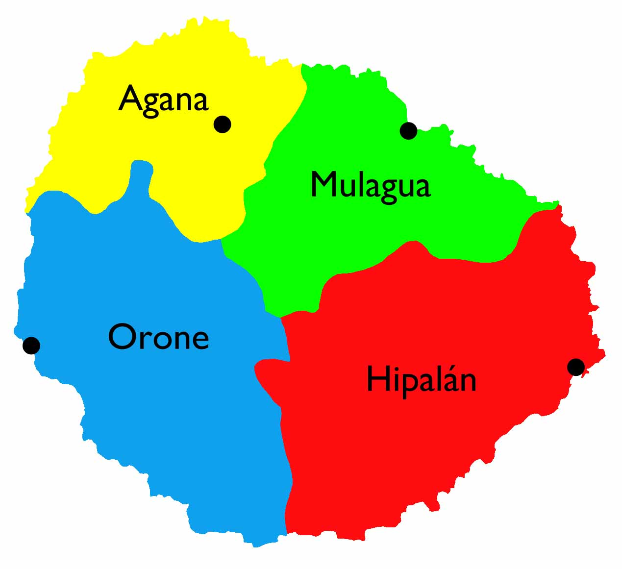 Distribución de los bandos de La Gomera: Agana (Vallehermoso) Mulagua (Hermigua) Hipalán (San Sebastián) Orone (Valle Gran Rey)